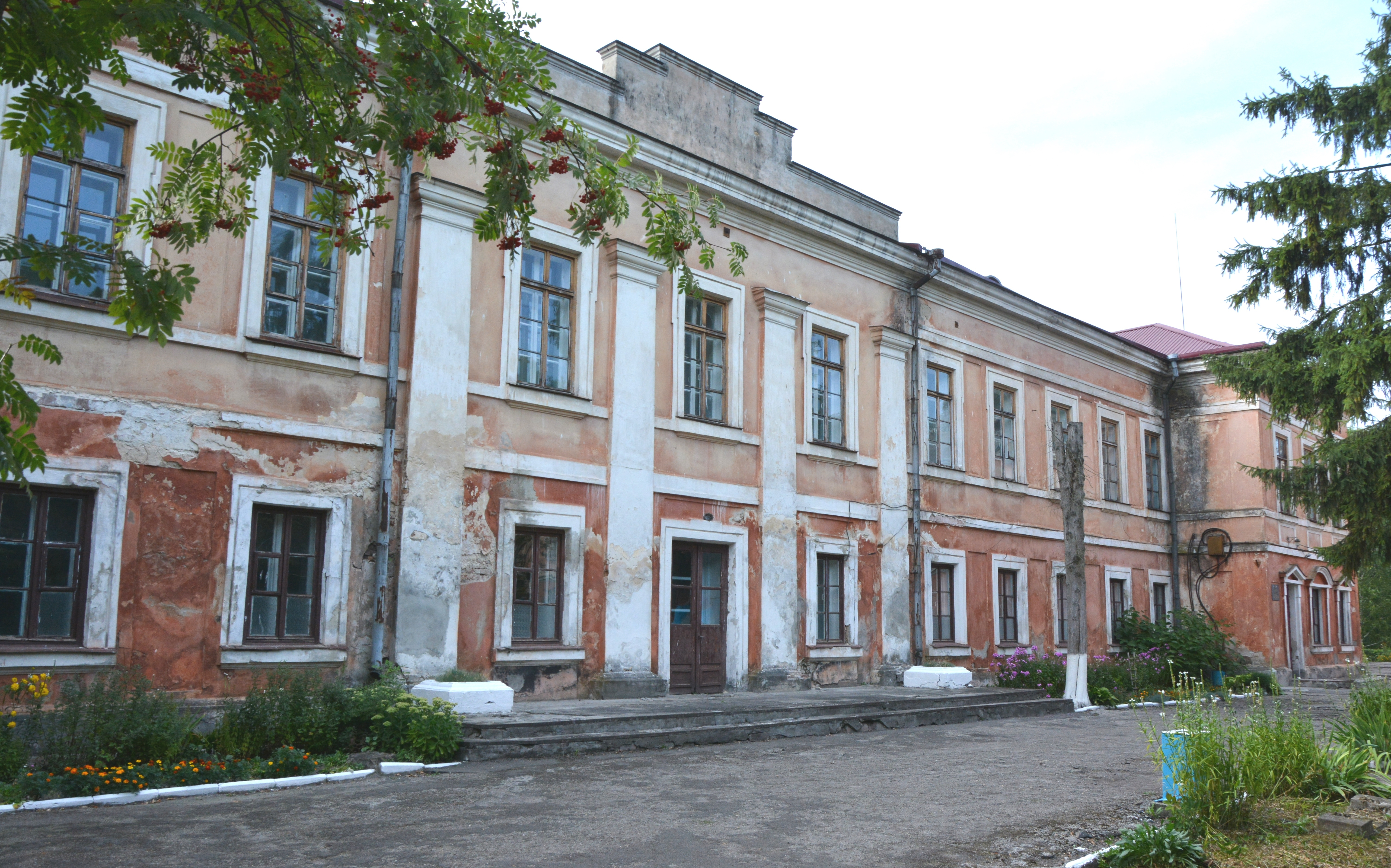 Палац Мьончиньских (мур.), Луків